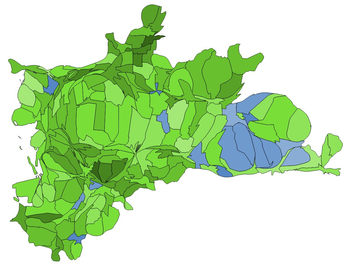 顏色對照表